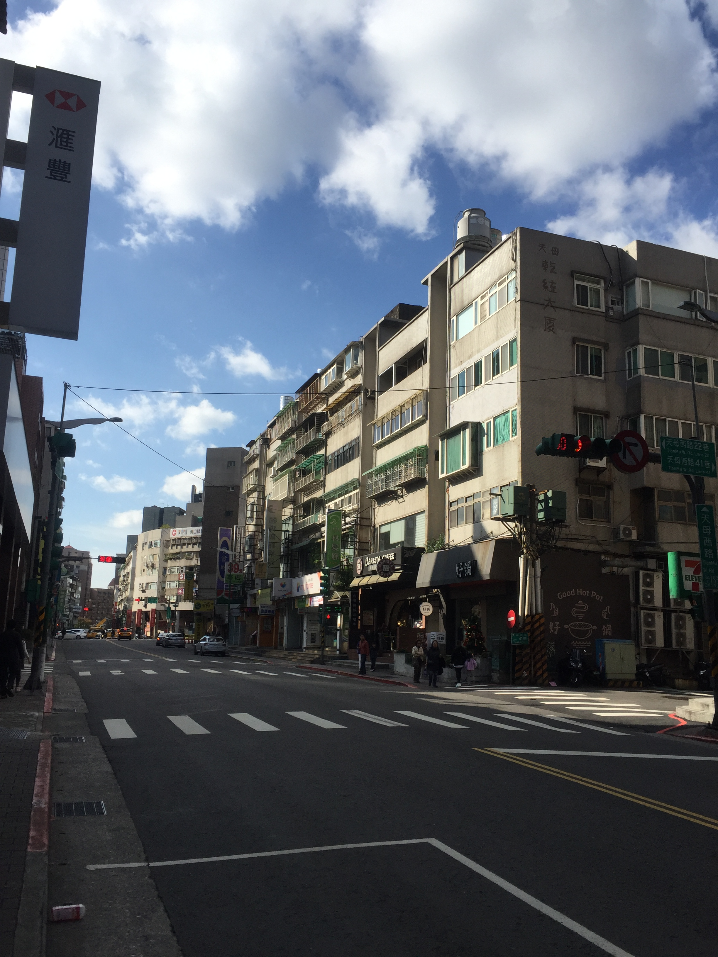 台北市士林區天母西路早上六點之晨景